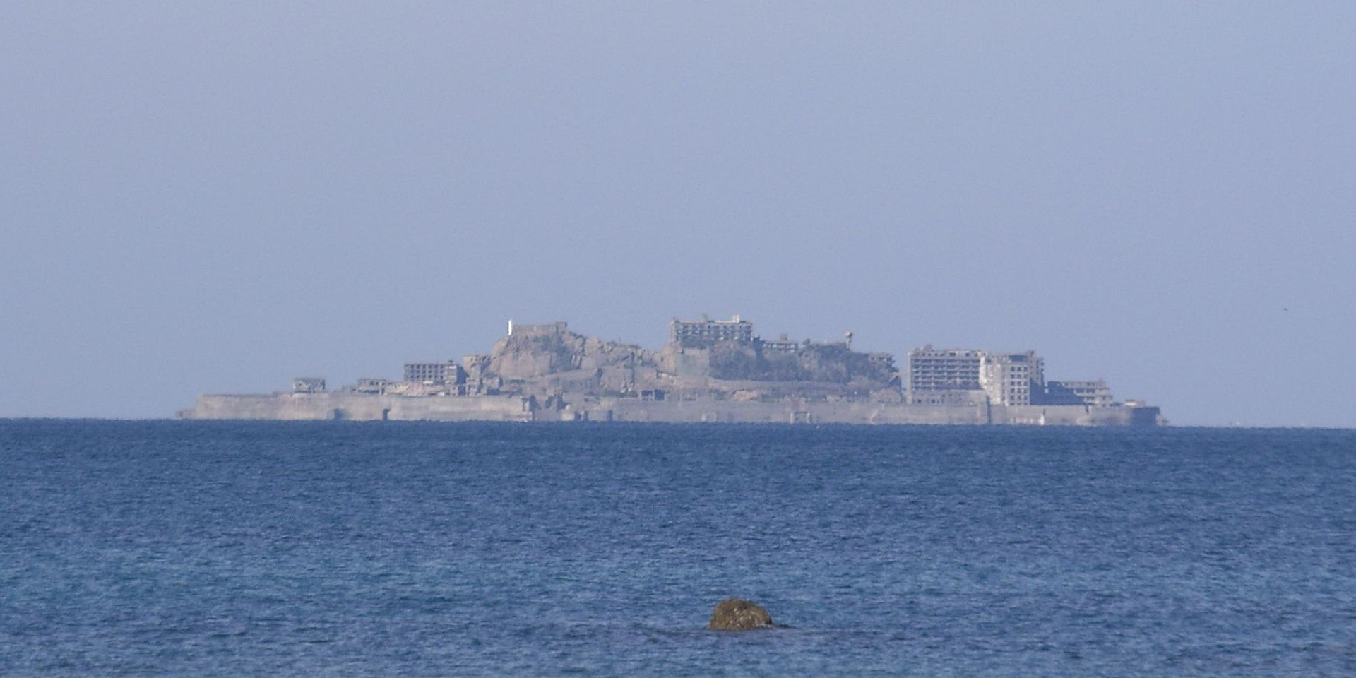 端島(Hashima), 野母崎・古里港（長崎市高浜町）から撮影(from Furusato, Takahama-machi, Nagasaki), 浮き島現象で僅かに海面から浮き上がって見える